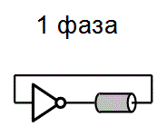 Fig1_ring_oscillator